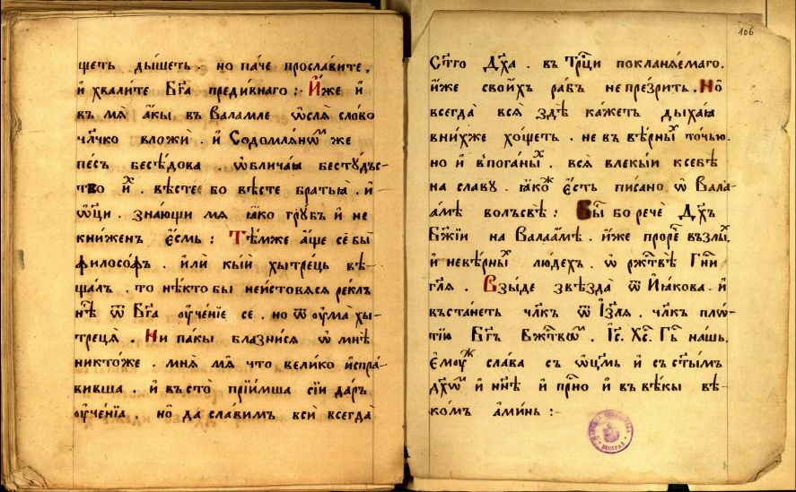 Беседа на јерес богумилу, Sermon against bogomils heresy